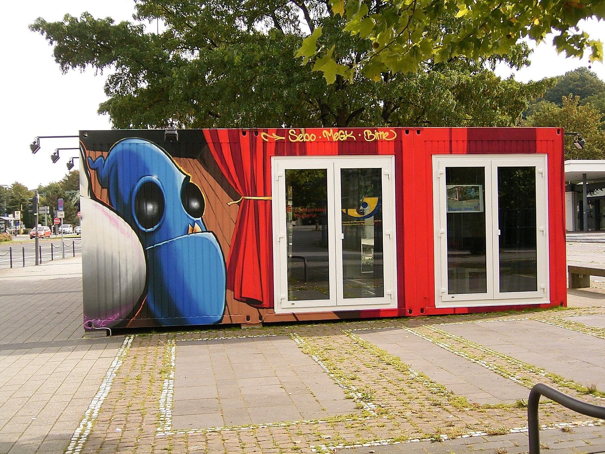 Der Container in Wuppertal-Elberfeld